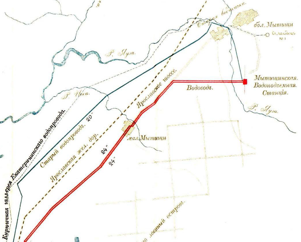 План водоснабжения Москвы 1890-99 гг.